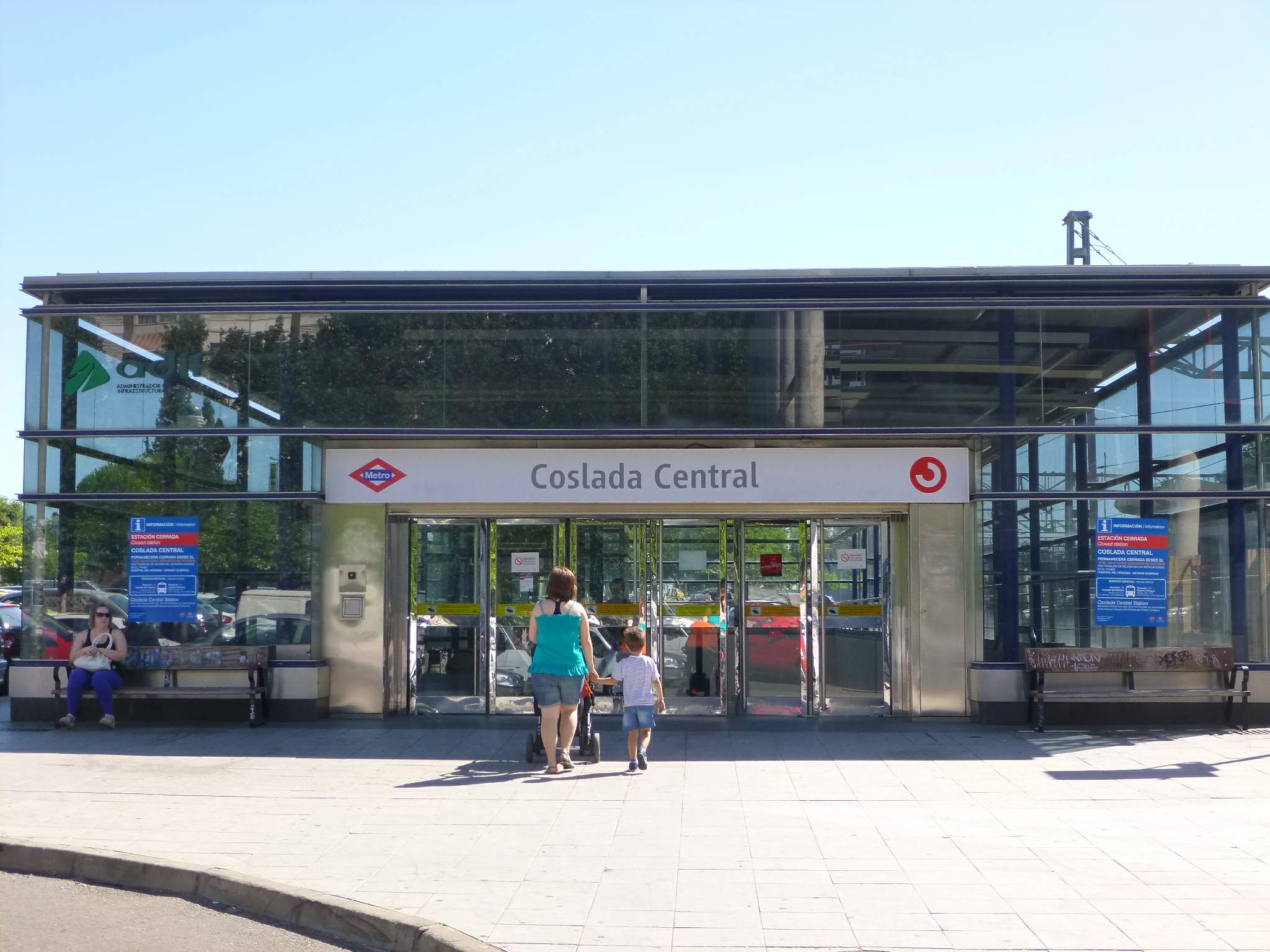 Estación de Coslada Central, de Madrid Metro y Renfe Cercanías